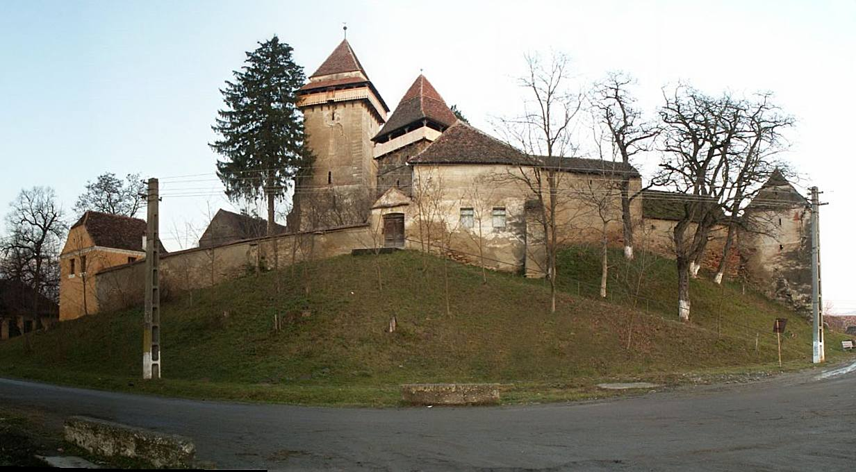 Biserica fortificată din Apold